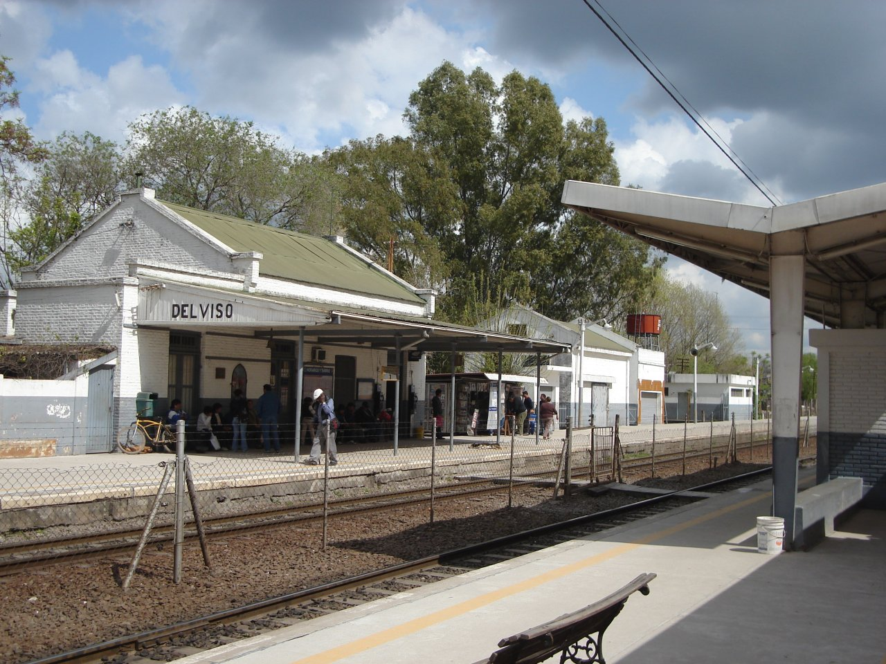 Edificio principal de la estación Del Viso del Ferrocarril General Belgrano vista desde el andén número 2. Del Viso, partido del Pilar, provincia de Buenos Aires, República Argentina.